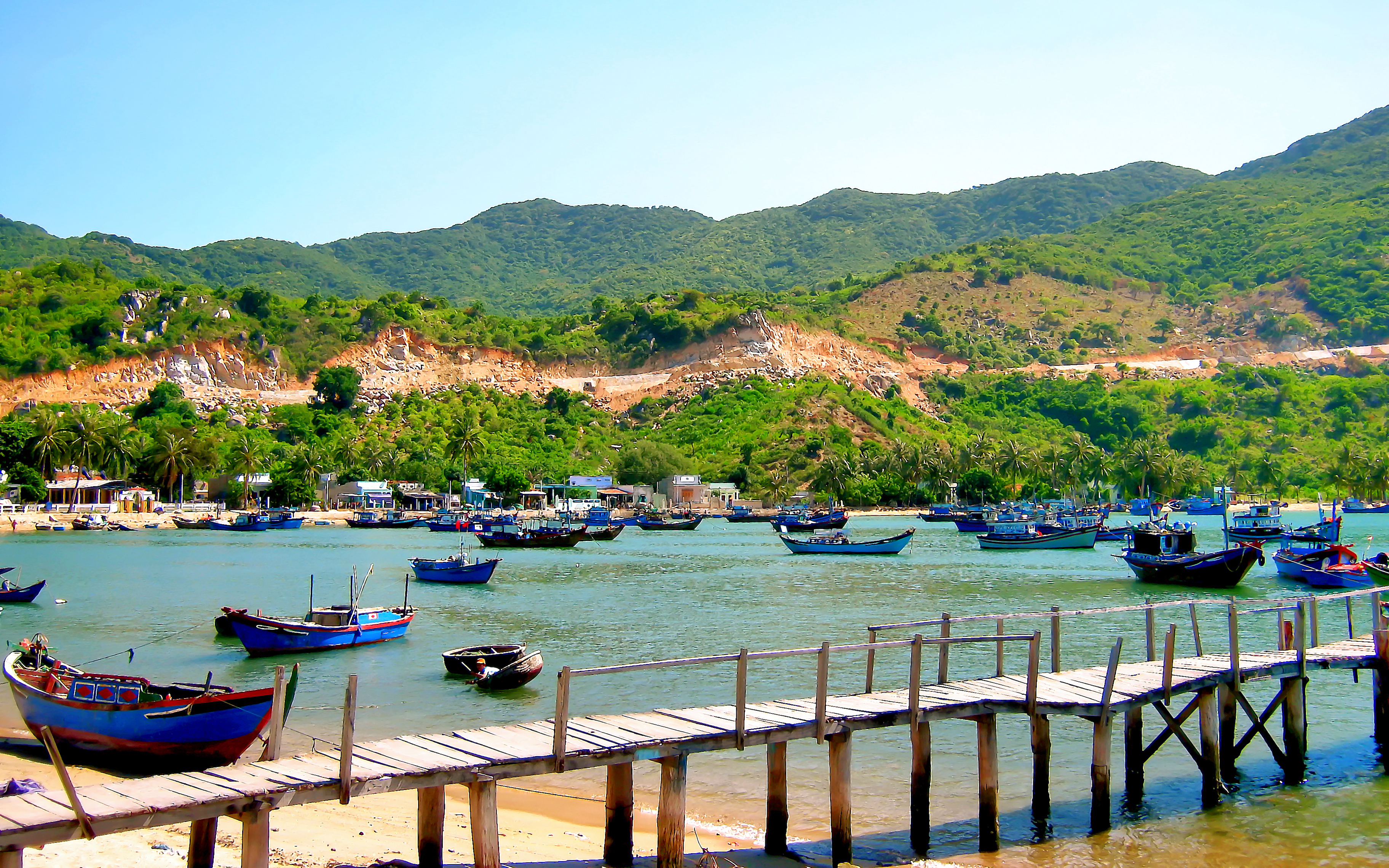 Một làng đánh cá tại vịnh Vĩnh Hy, thuộc xã Vĩnh Hải, huyện Ninh Hải, tỉnh Ninh Thuận, Việt Nam.